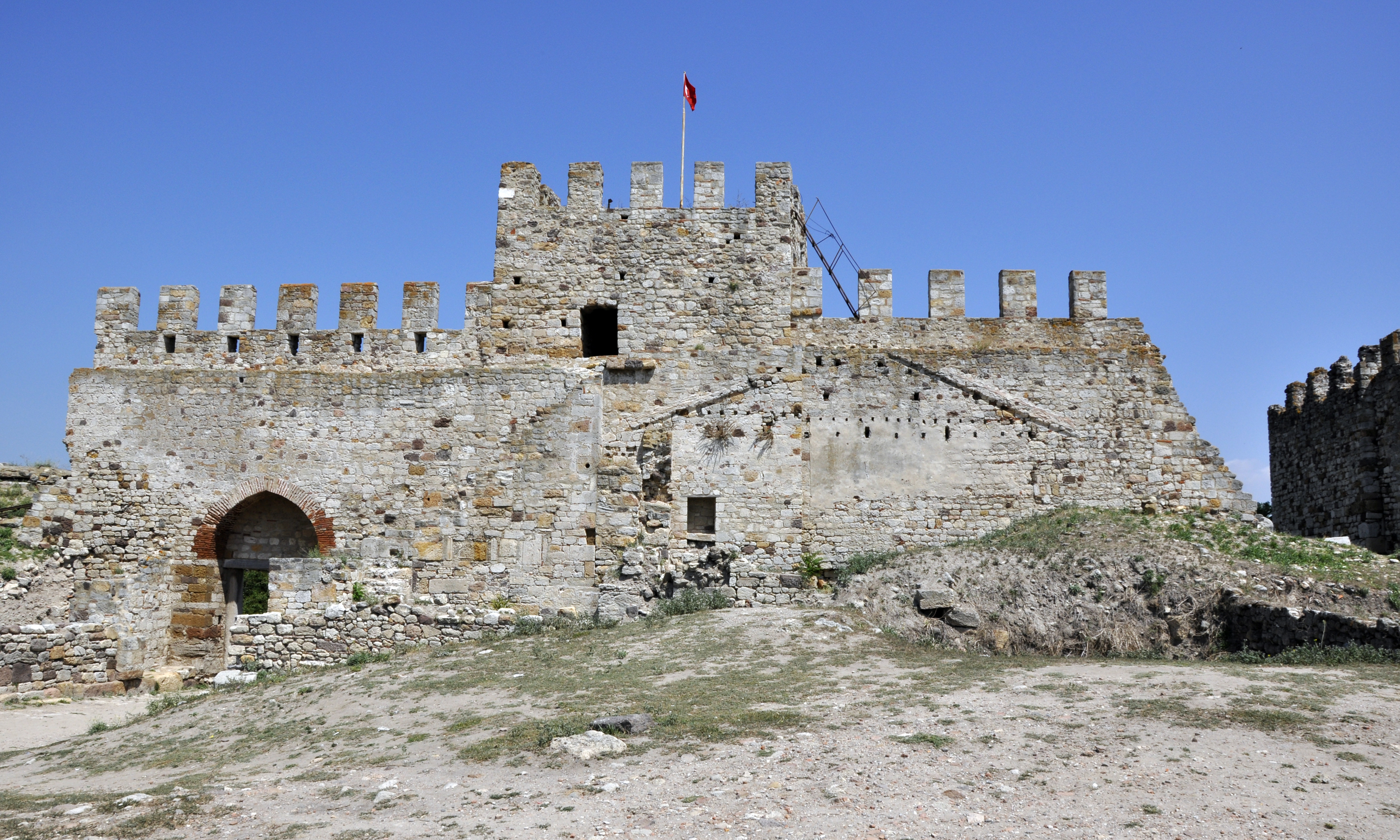 Enez Kalesi